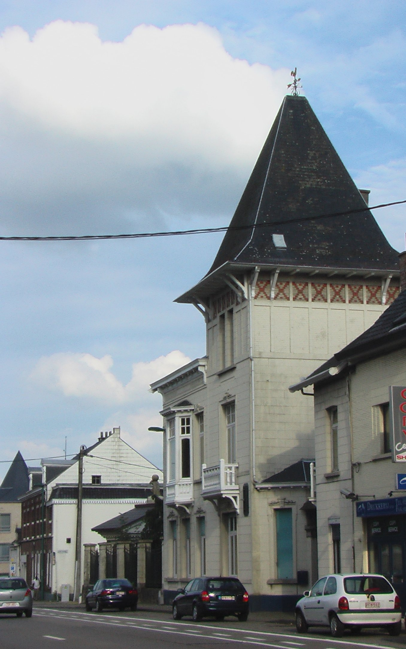 Afspanning In Voscapel, gebouwd in 1719, gelegen aan de Brusselsesteenweg in Kortenberg, België. Typische dakconstructie met toren, die in de negentiende eeuw werd overgenomen in de Kortenbergse villa's.